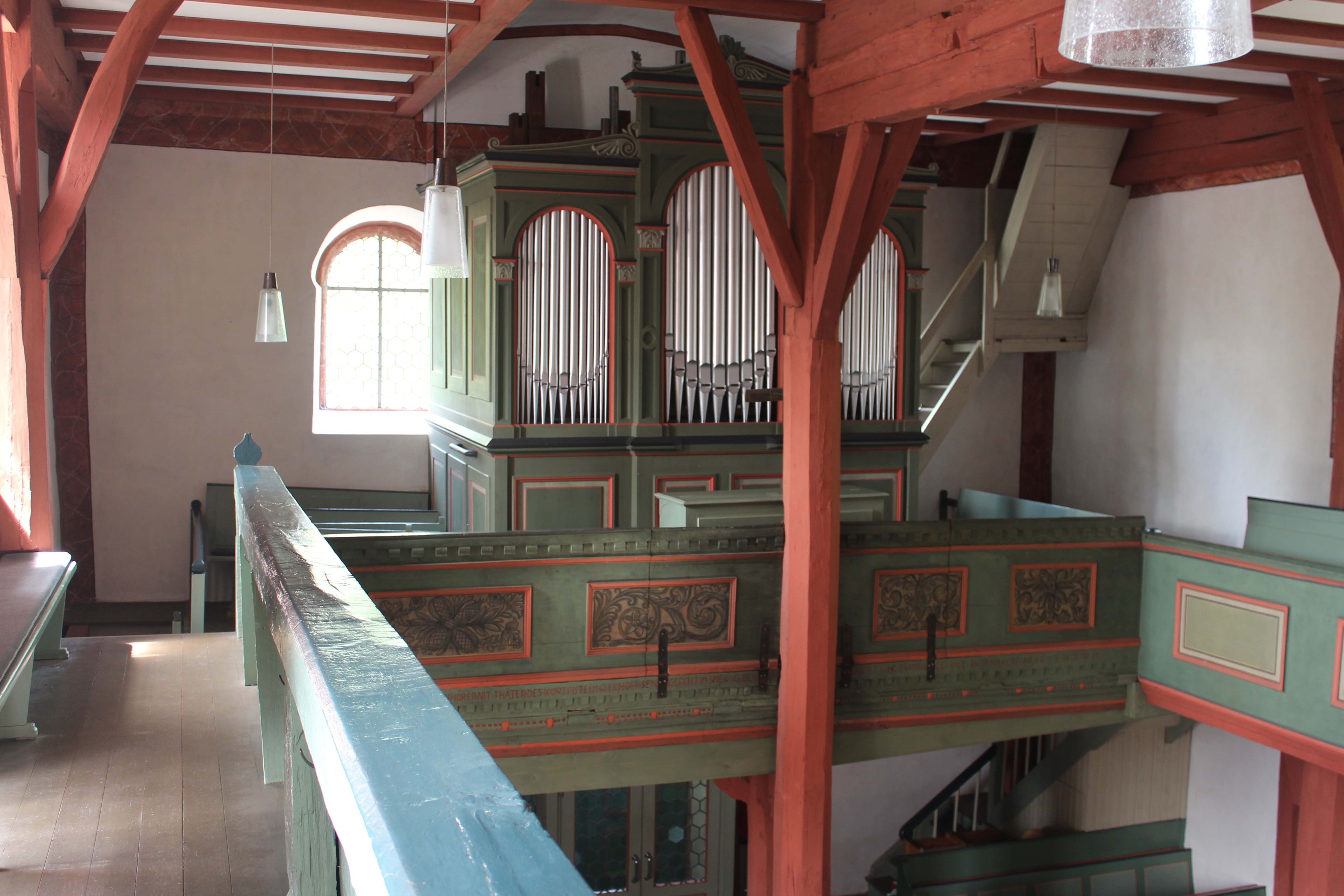 Prospekt der Orgel der Evangelischen Kirche zu Hohenahr-Erda